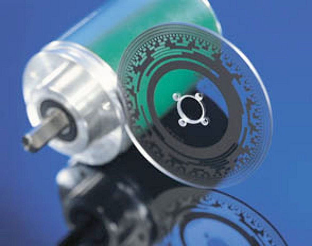 photographie d'un codeur absolu